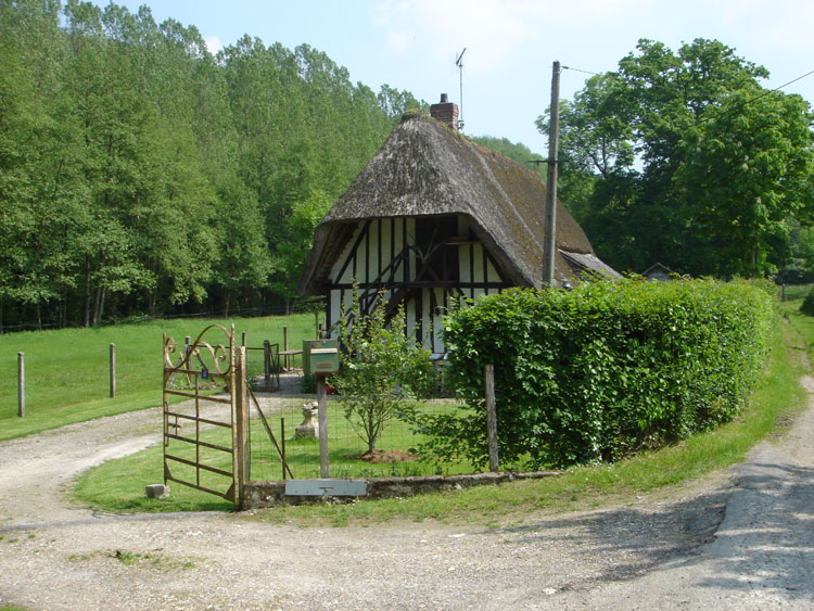 Chaumière, habitat rural en Normandie.